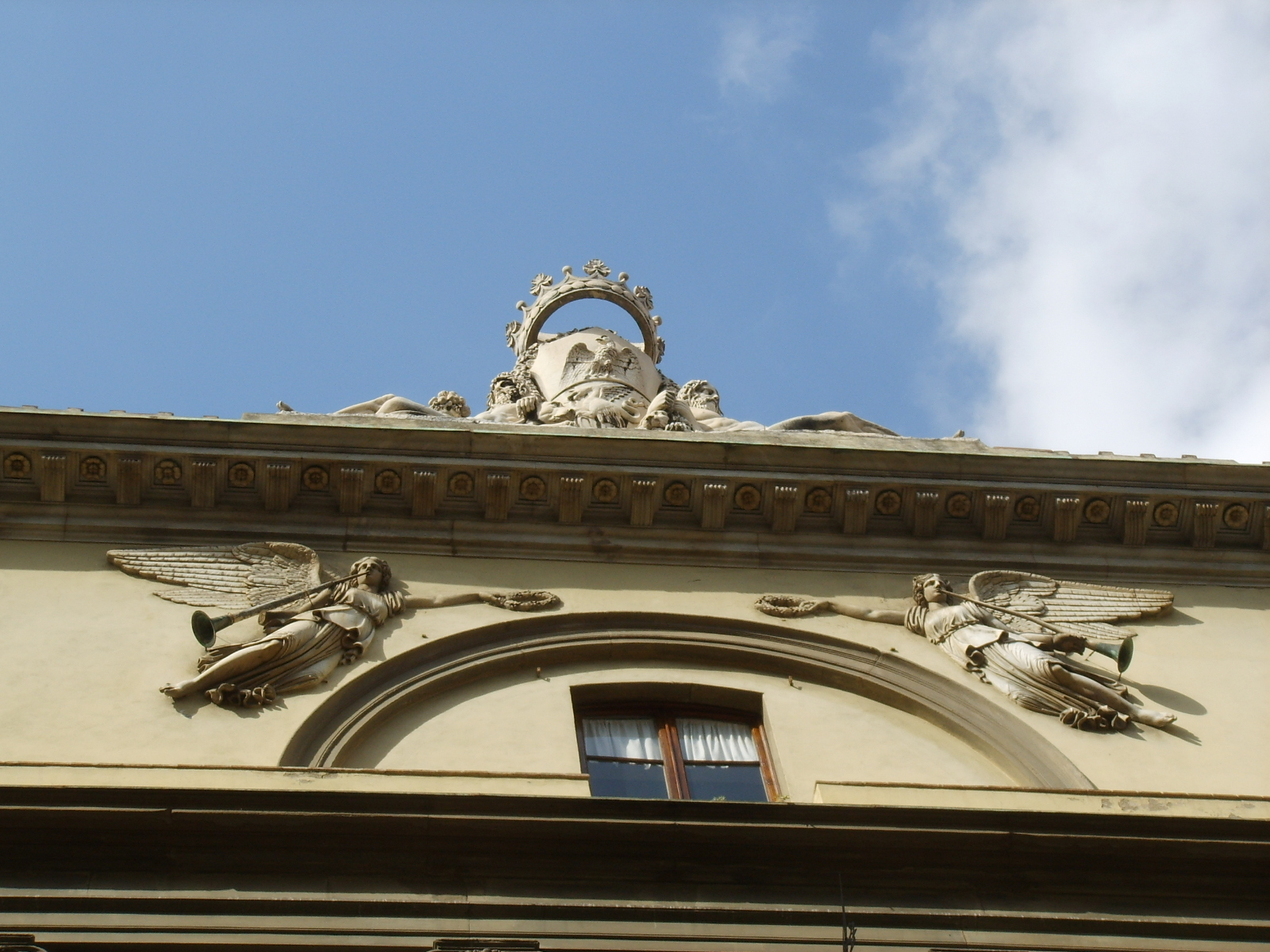 Palazzo borghese stemma